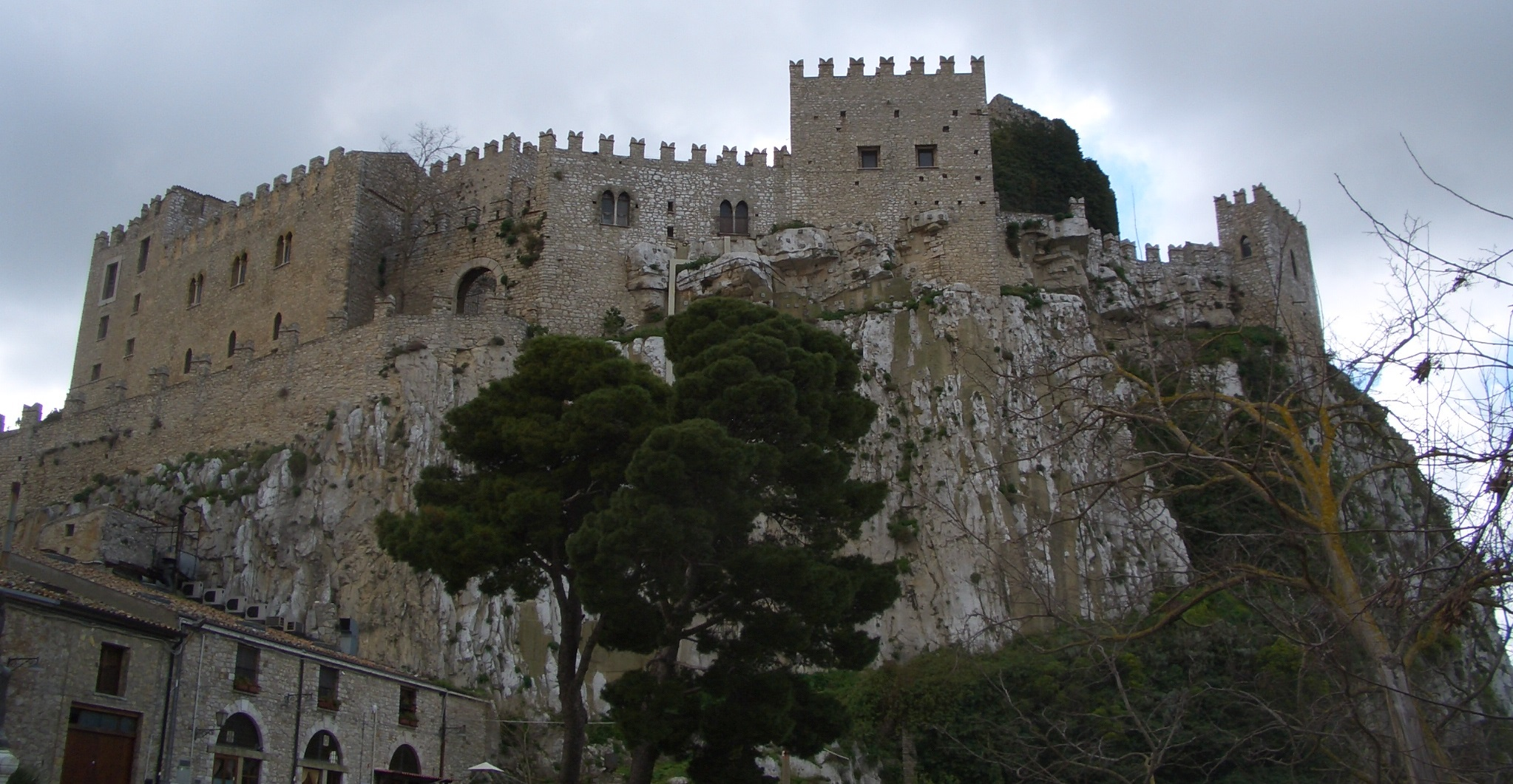 Il castello di Caccamo visto da nordovest (strada statale 285)